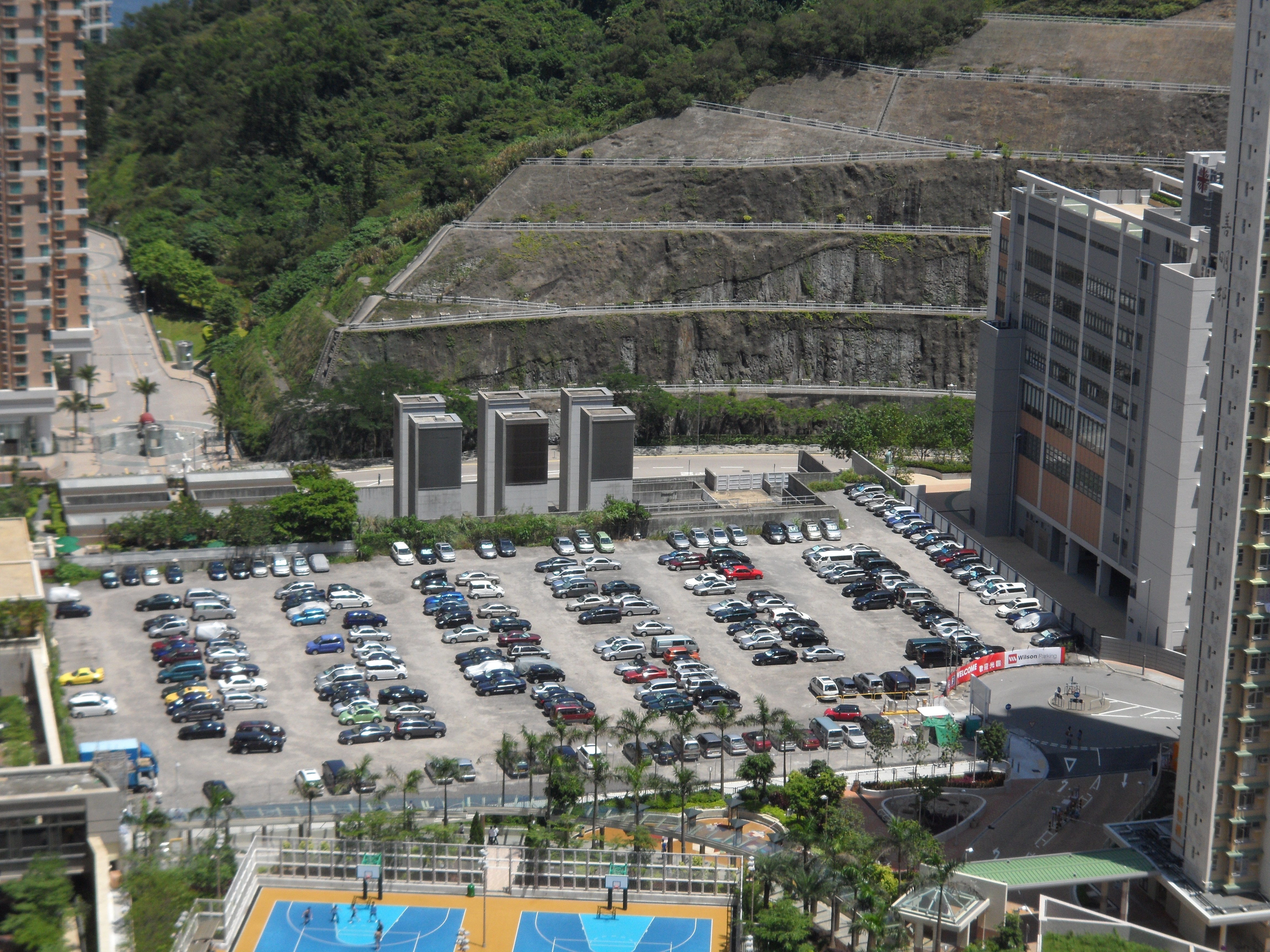 從高處眺望善明邨威信停車場